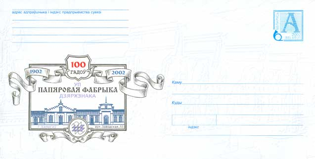 1902-2002. 100 гадоў. УП Папяровая фабрыка Дзяржзнака. г. Барысаў, вул. Завадская, 55. будынак фарбыкі. 110х220мм. 3. 5494-02. Т. 95500